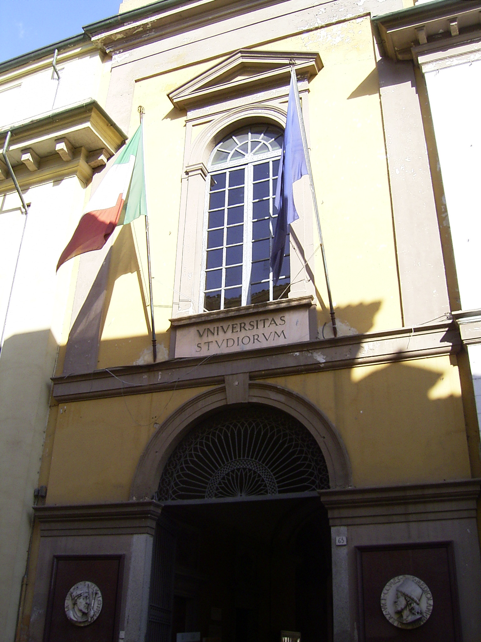 Ingresso principale dell'Università (Main entrance of the University); Pavia, Italy